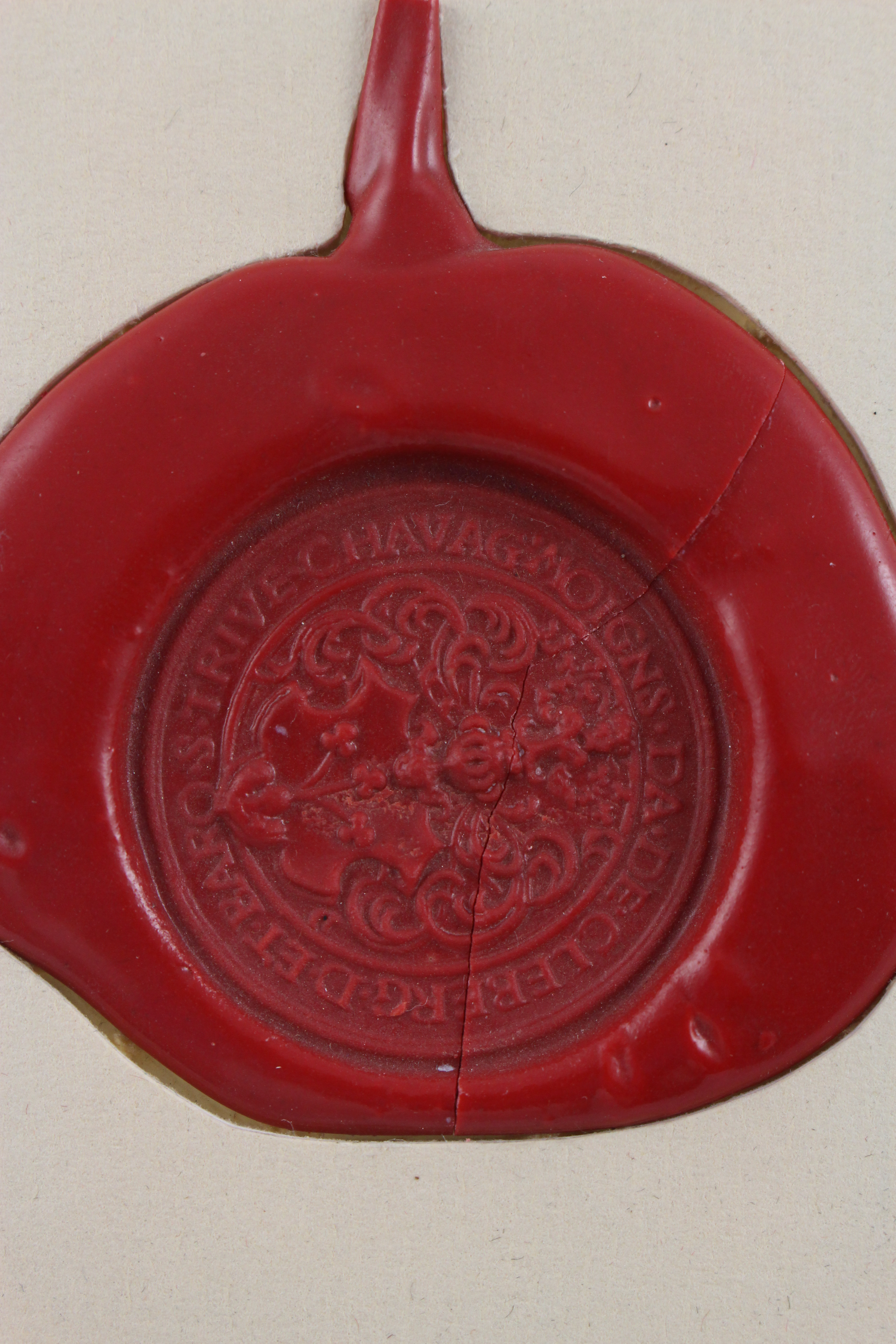 Sceau et bourse de David Cléberger ; Propriété du Musée des Hospices civils de Lyon -Propriété Musée de France. INV : 2007.0.1827.M 566